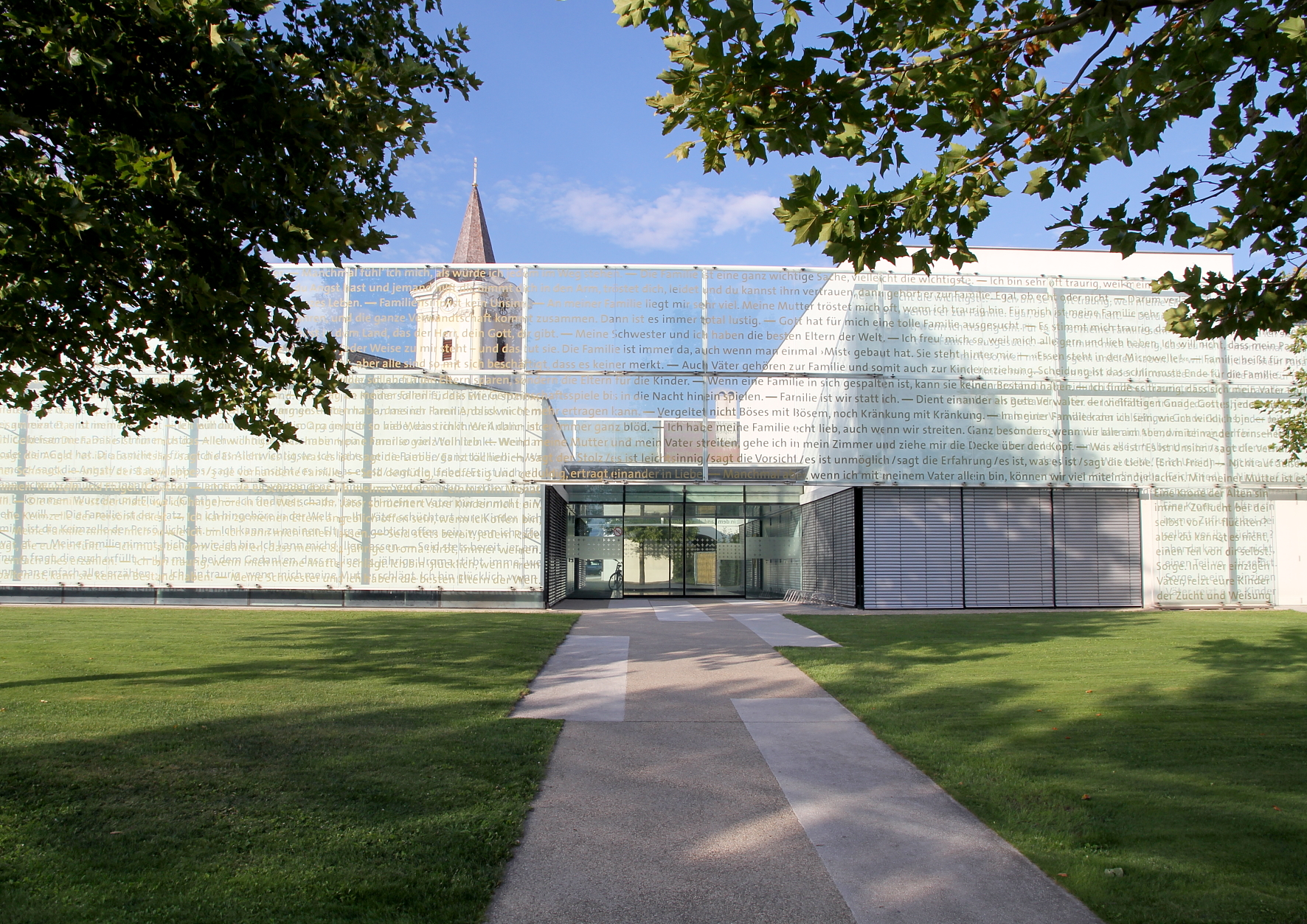 Das Pfarrzentrum in der burgenländischen Gemeinde Podersdorf. Im Hintergrund der spätbarocke Kirchenturm und im Vordergrund der Zubau nach Plänen von den Architekten Lichtblau und Wagner.